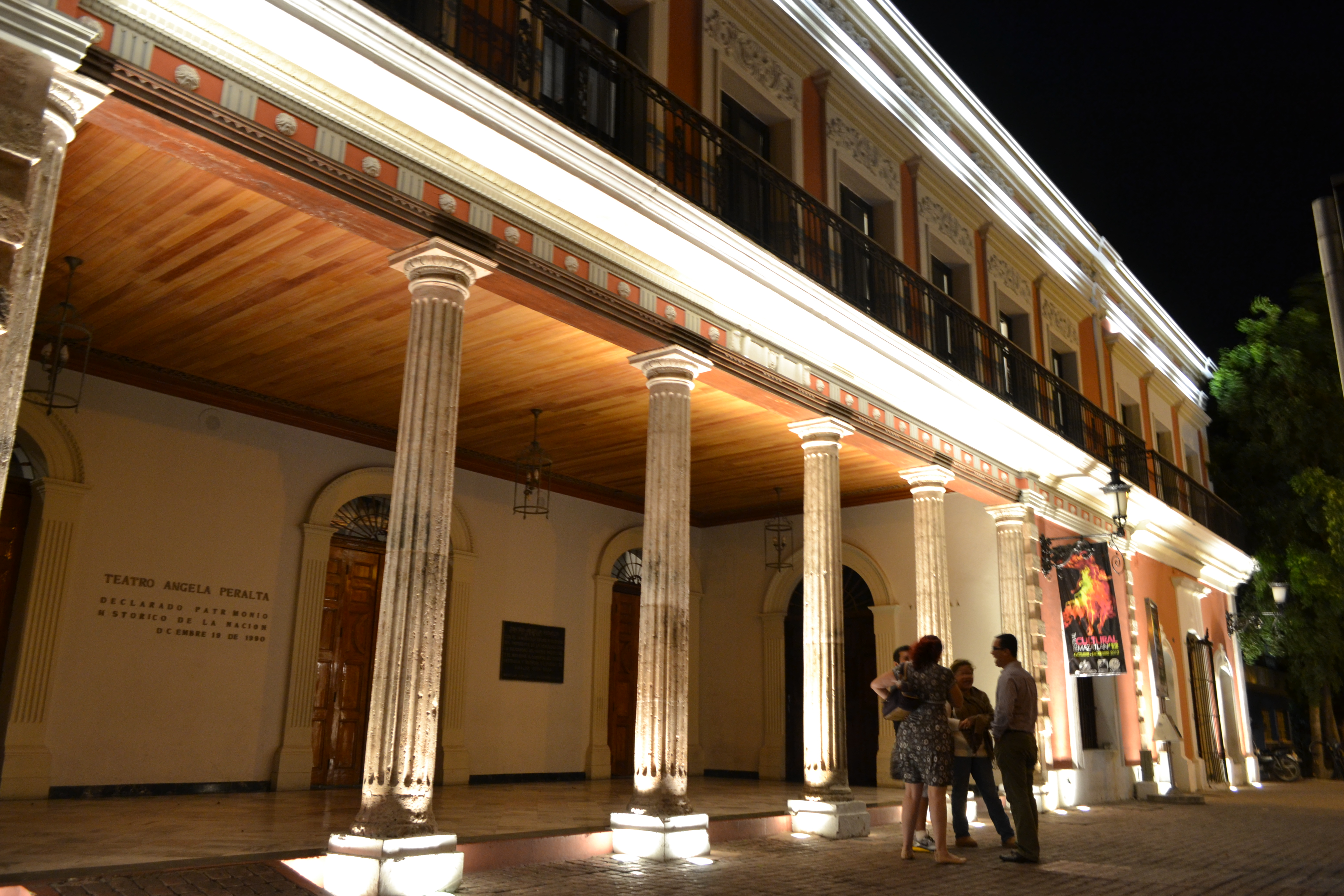 Entrada principal del teatro Ángela Peralta en la plazuela Machado, Mazatlán, Sinaloa.